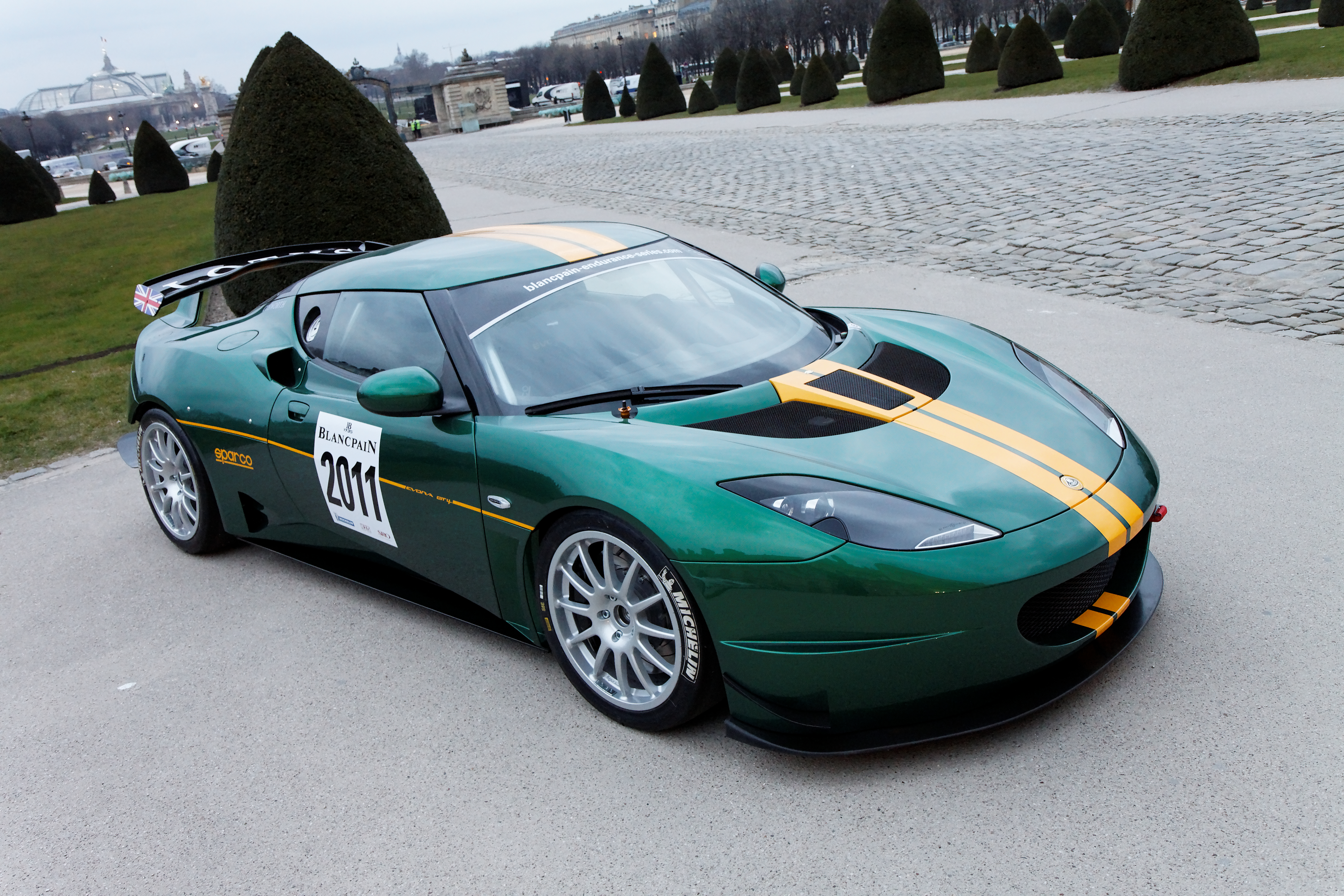 Photographie prise lors de la présentation du Blancpain Endurance series aux Invalides à Paris en mars 2011.